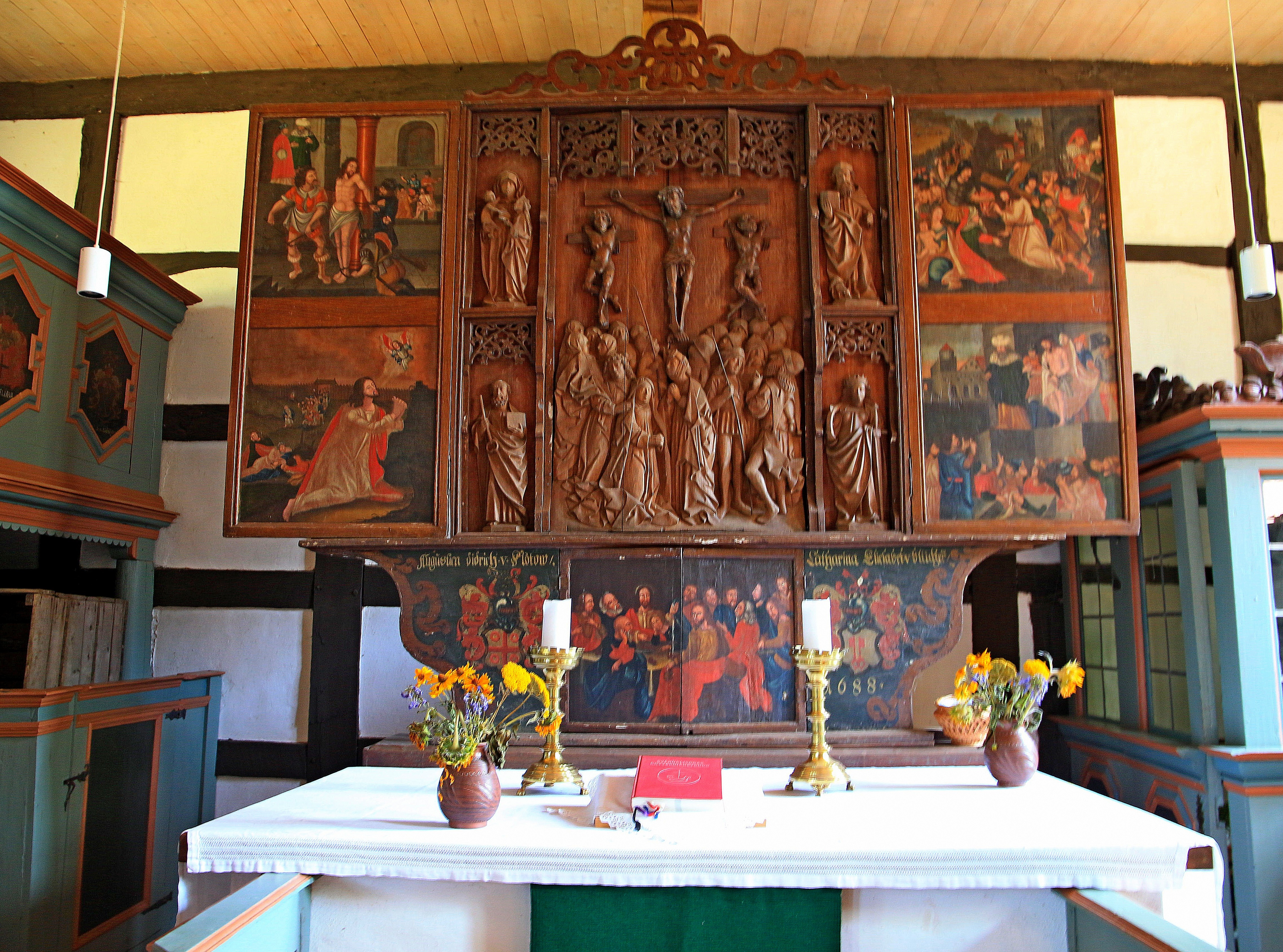 Ganzliner Kirche